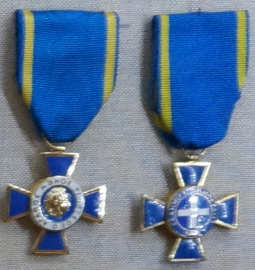 Présentées au musée.